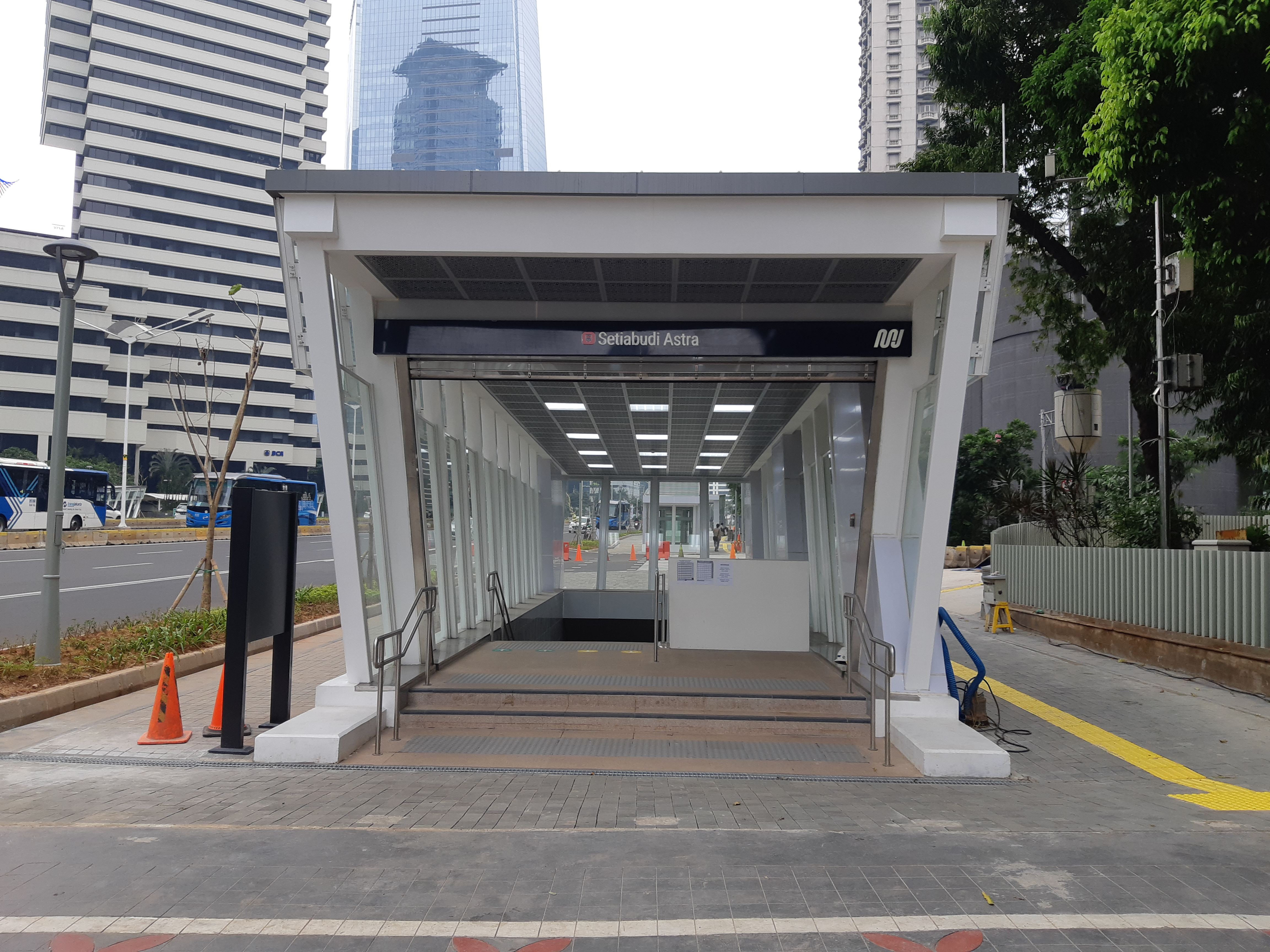 Pintu Stasiun MRT Setiabudi